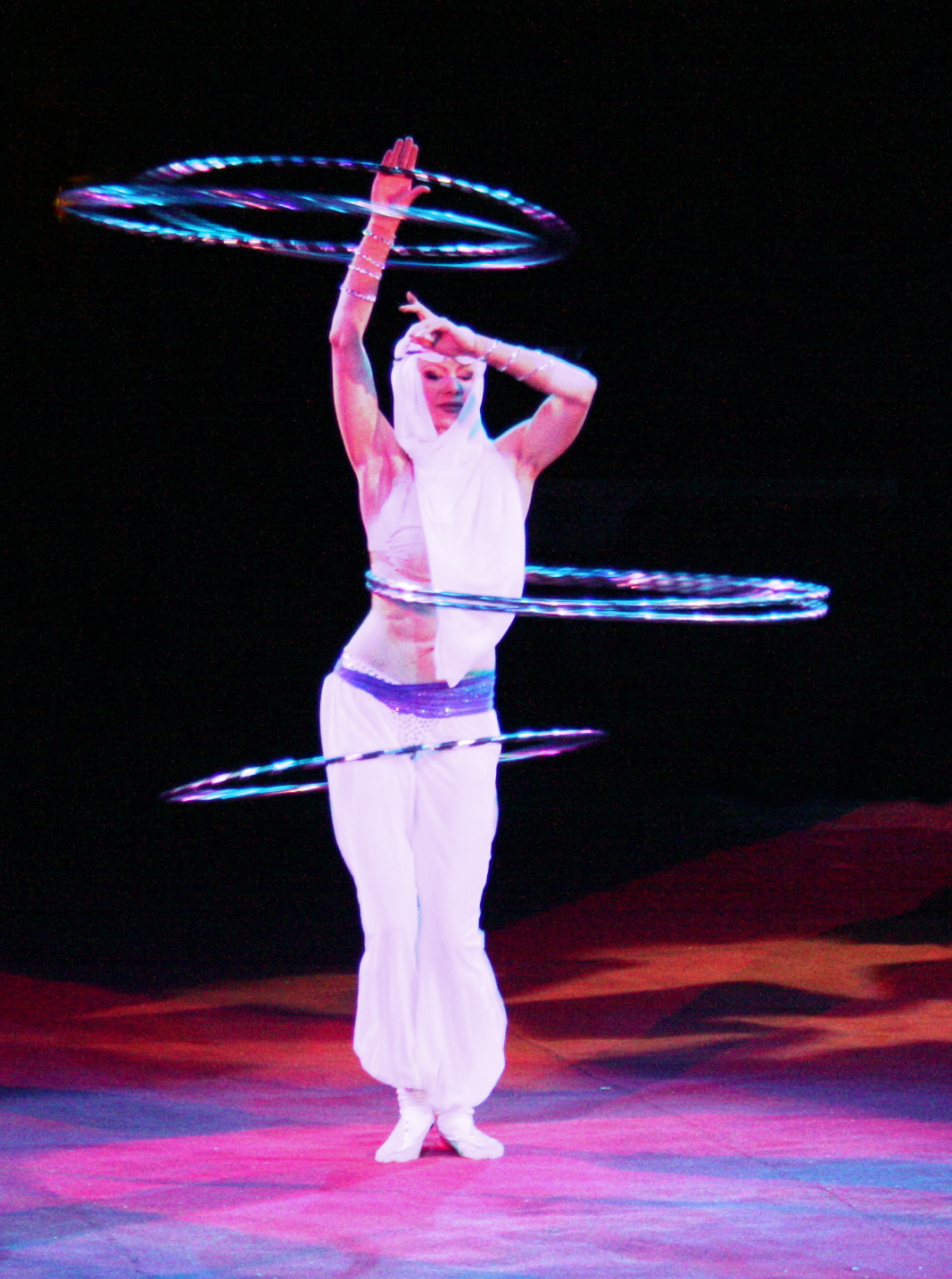 Hula-Hoop in Perfektion durch die Russin YELENA LARKINA aufgeführt im Zirkus.